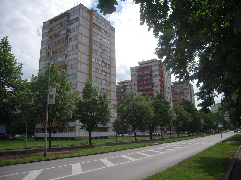 Borik